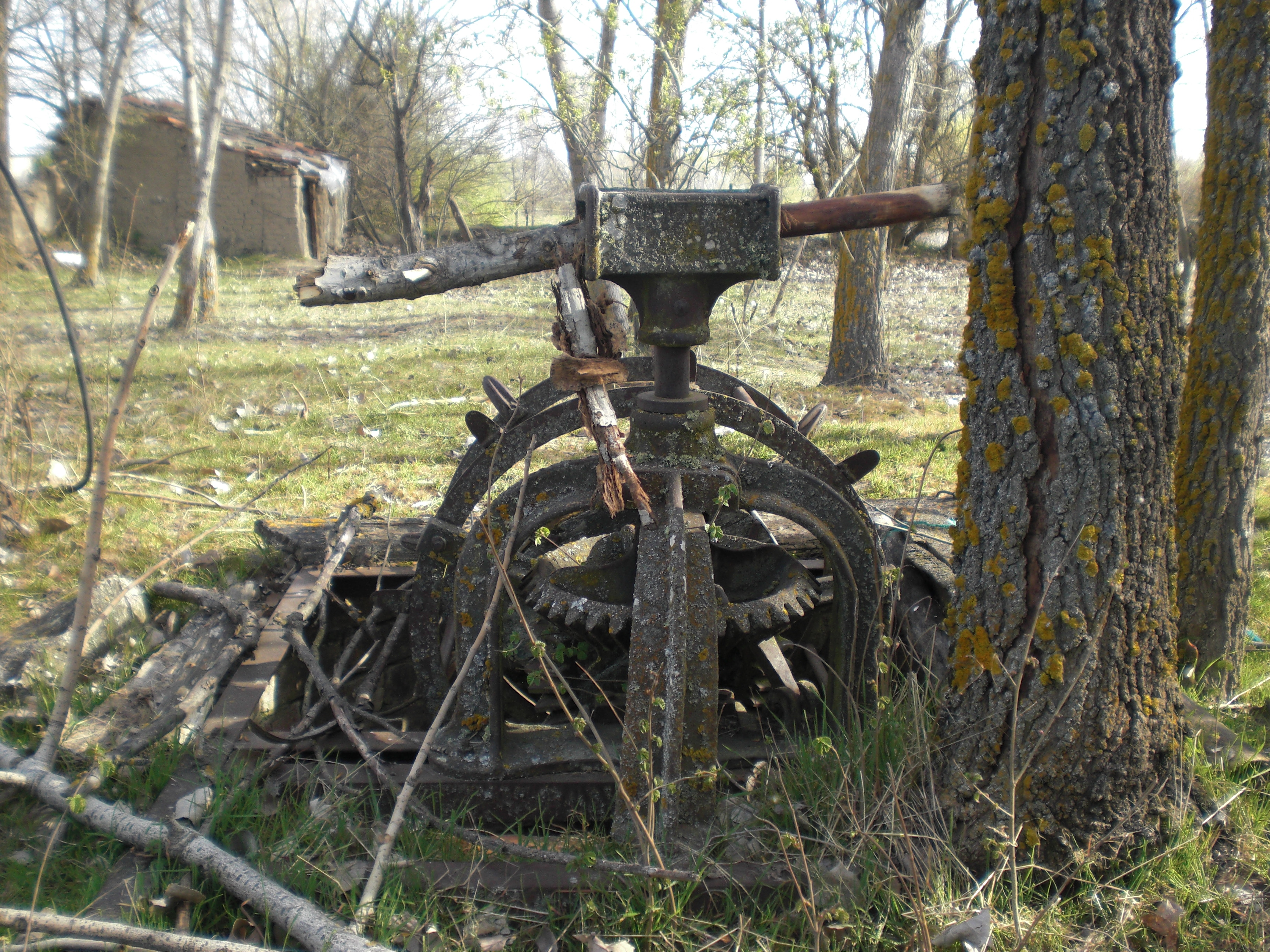 Noria de tipología árabe en Los huertos de Marugán